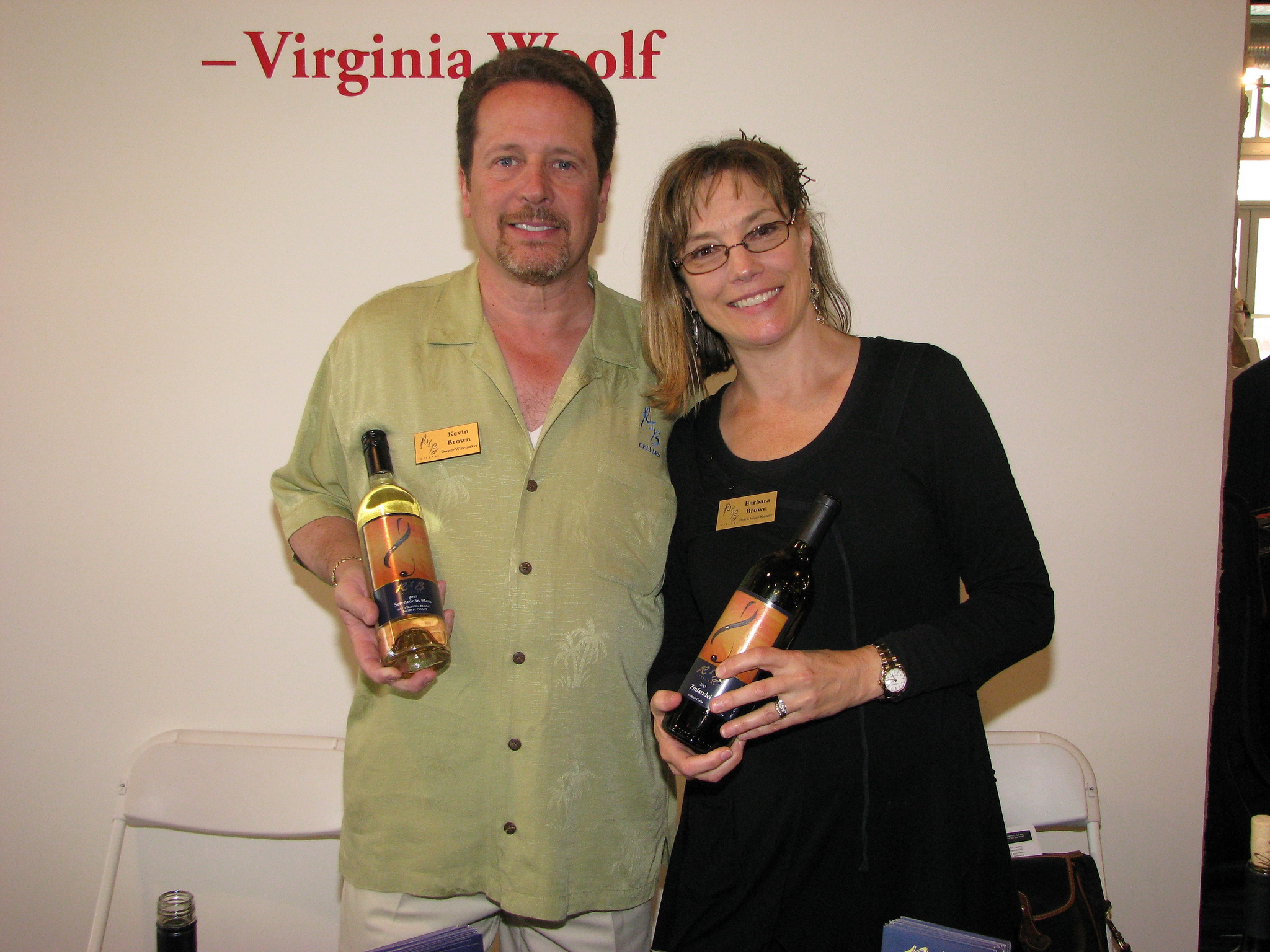 Présentation des vins de R&B Cellars, Alameda